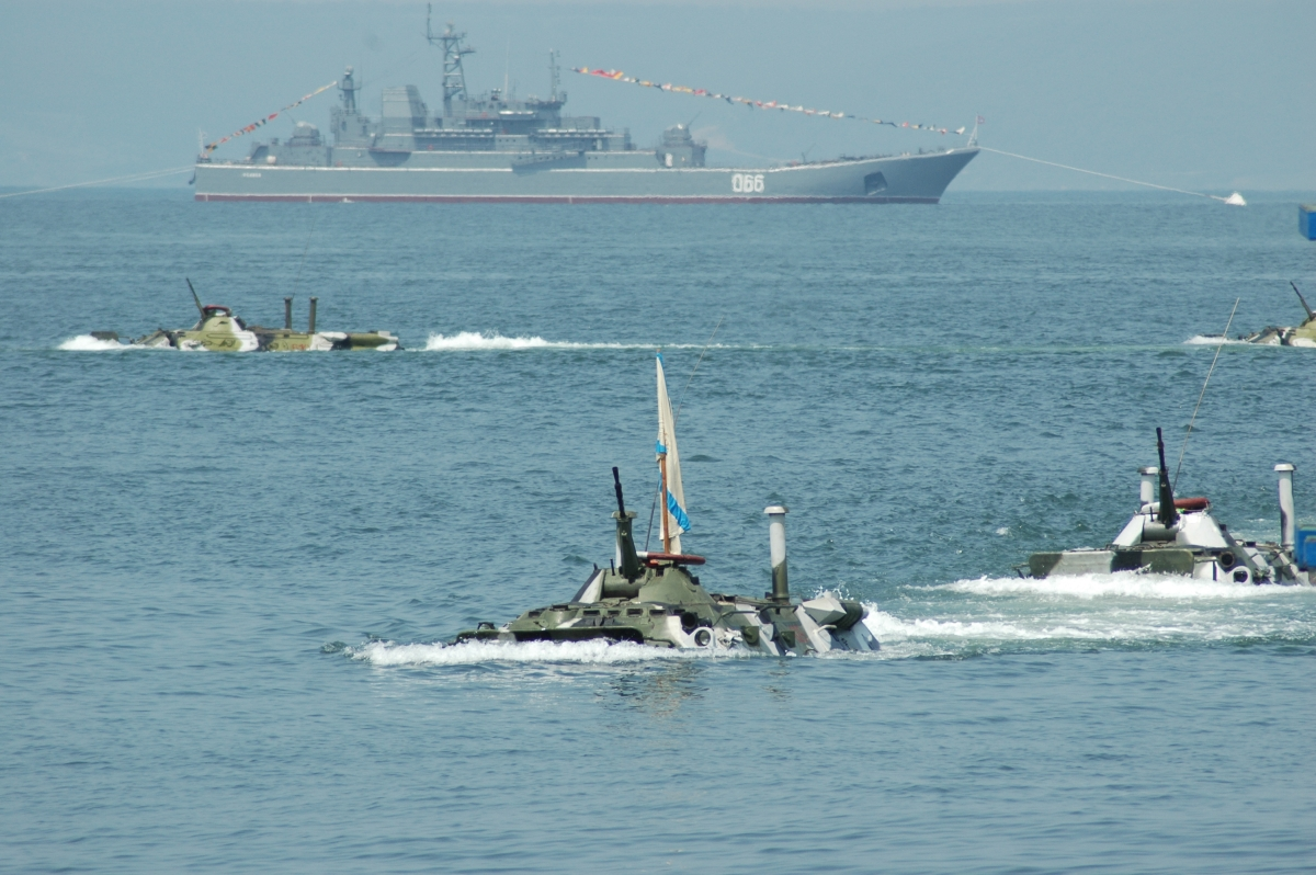 БДК Ослябя. Парад ВМФ Владивосток 2007.07.27